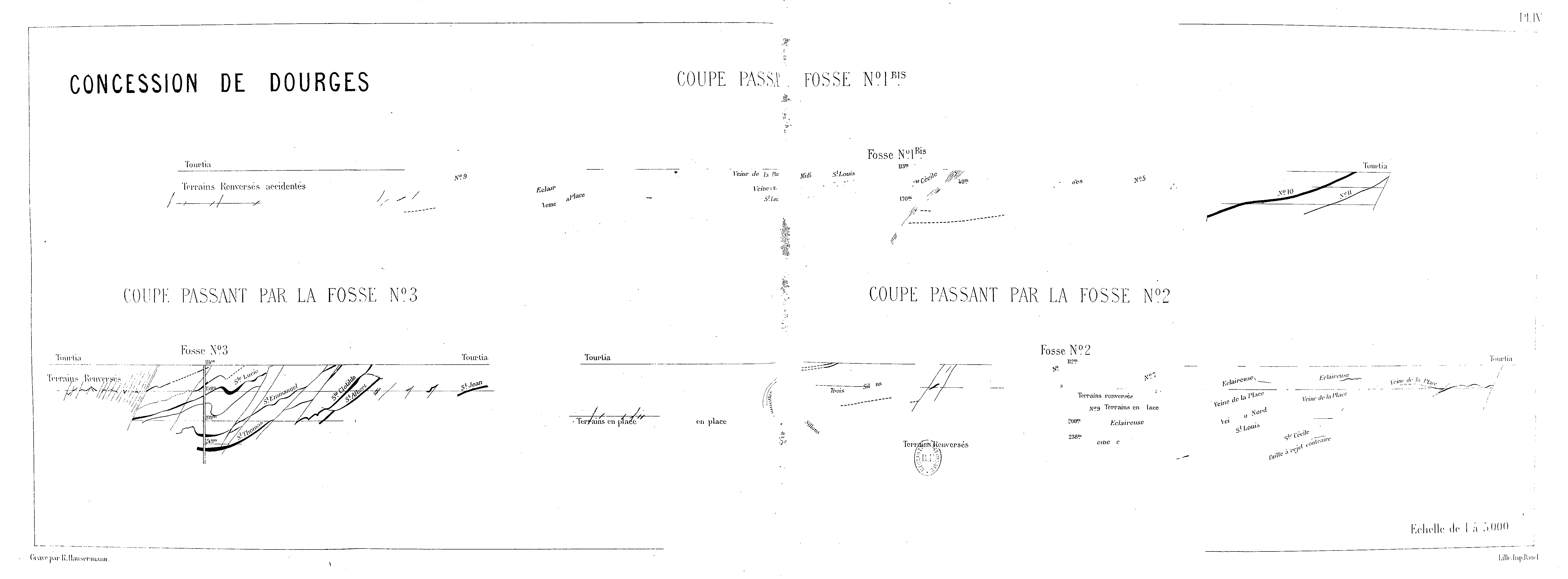 Compagnie des mines de Dourges.